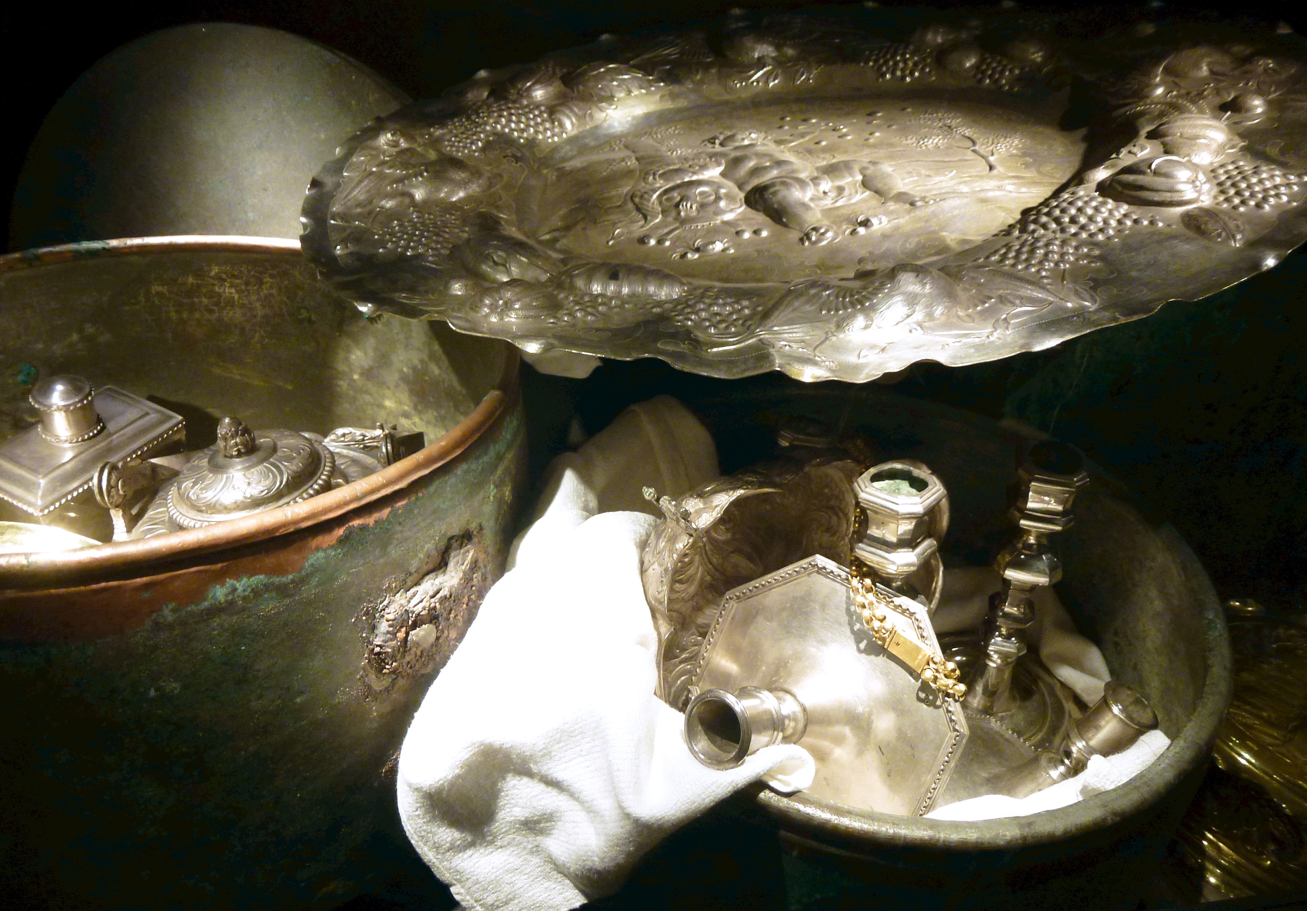 Loheskatten på Stockholms stadsmuseum